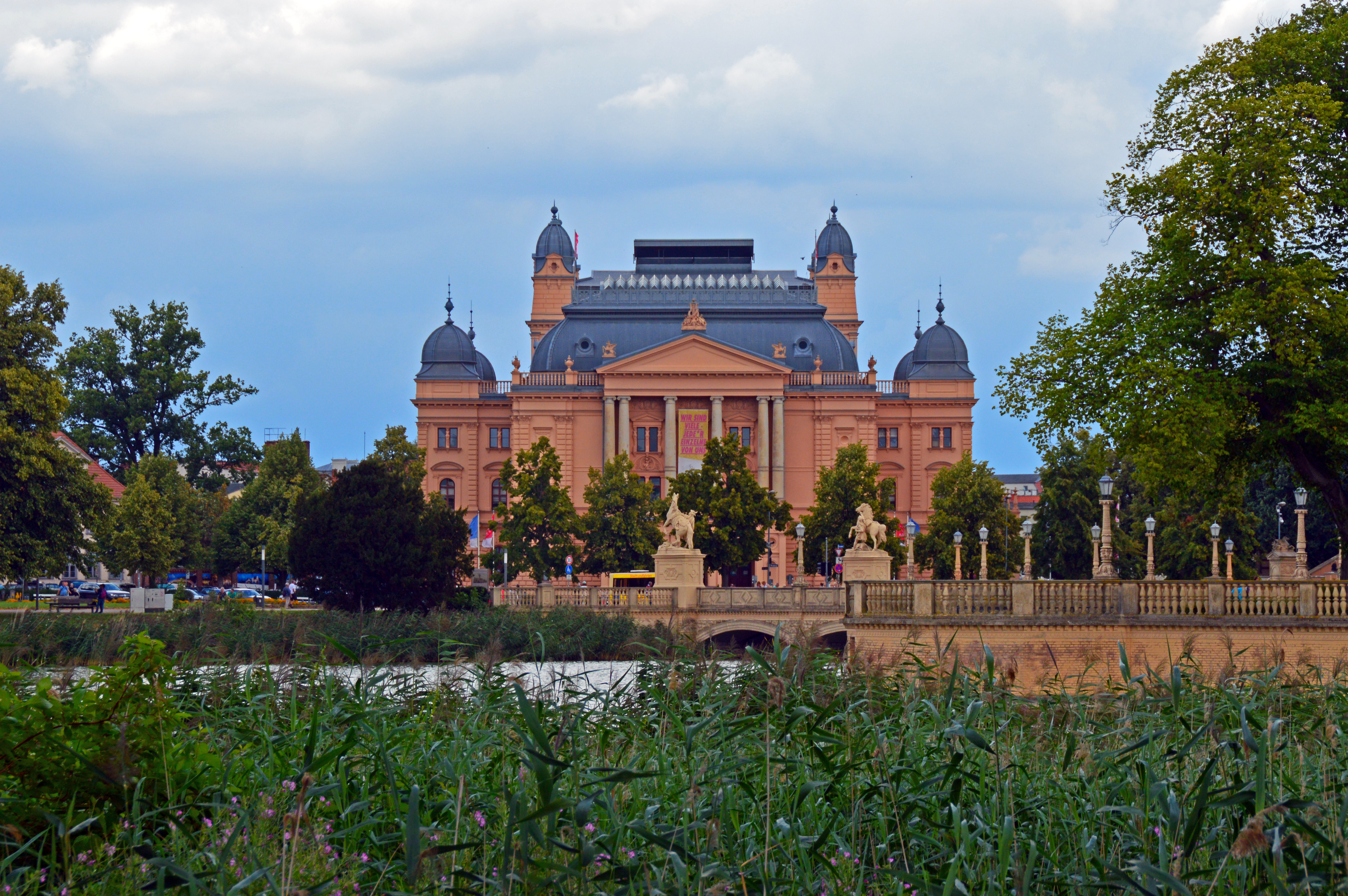 Schwerin Mecklenburgisches Staatstheater Schwerin Mecklenburg State Theatre Mecklenburg Staatstheater